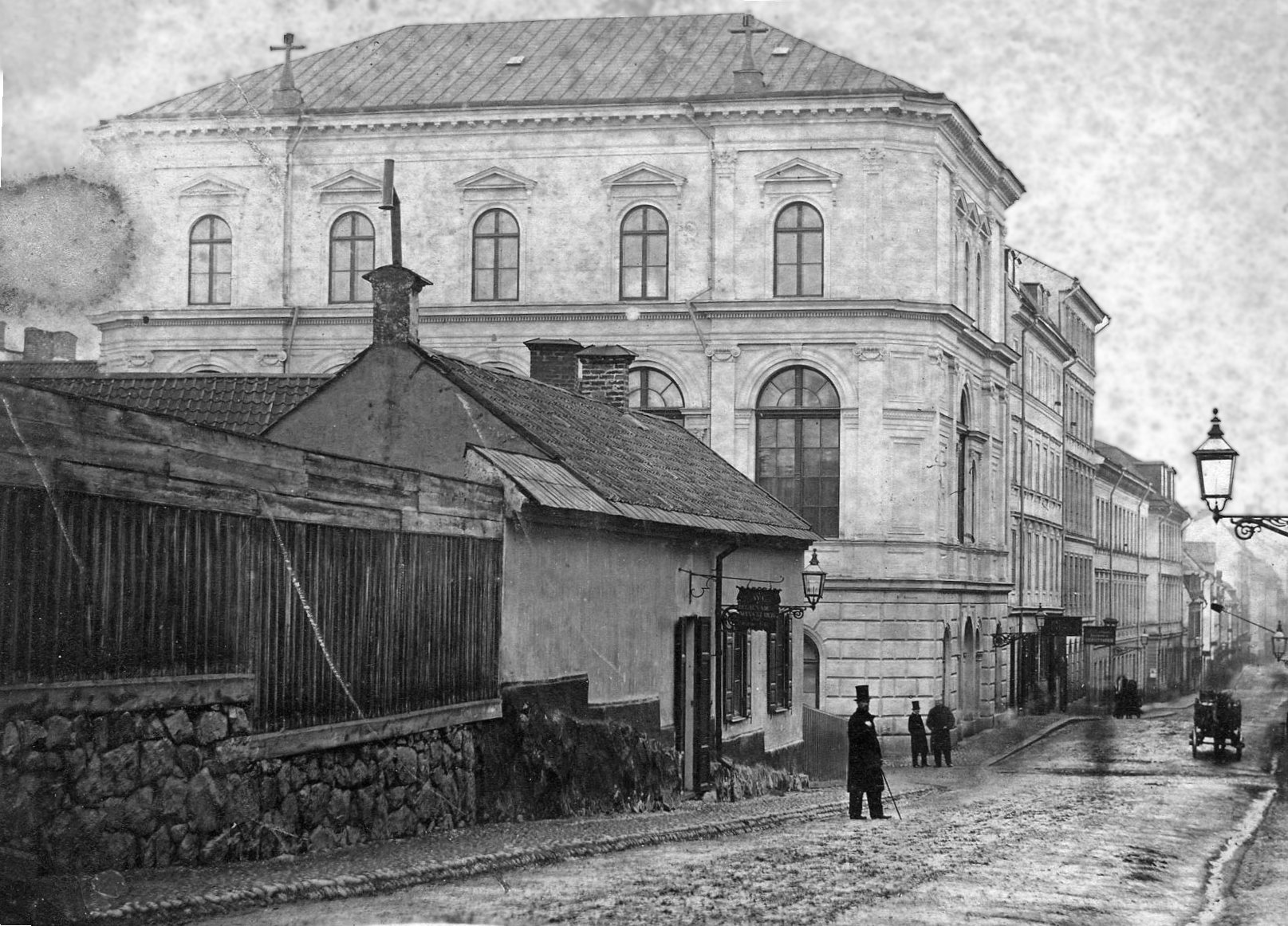 Betelkapellet var Stockholms första baptistförsamlings kapell. Arkitekt var A. F. Liljeström. Det invigdes redan söndagen den 5 november 1865 med gudstjänst både på för- och eftermiddagen. Kapellet låg på Malmskillnadsgatan 48 D. Under åren fick det betydelse även för andra organisationer, Svenska Missionsförbundet bildades här 2 augusti 1878. I samband med omdaningen av Norrmalm stängdes kapellet efter en välbesökt gudstjänst 27 maj 1962.